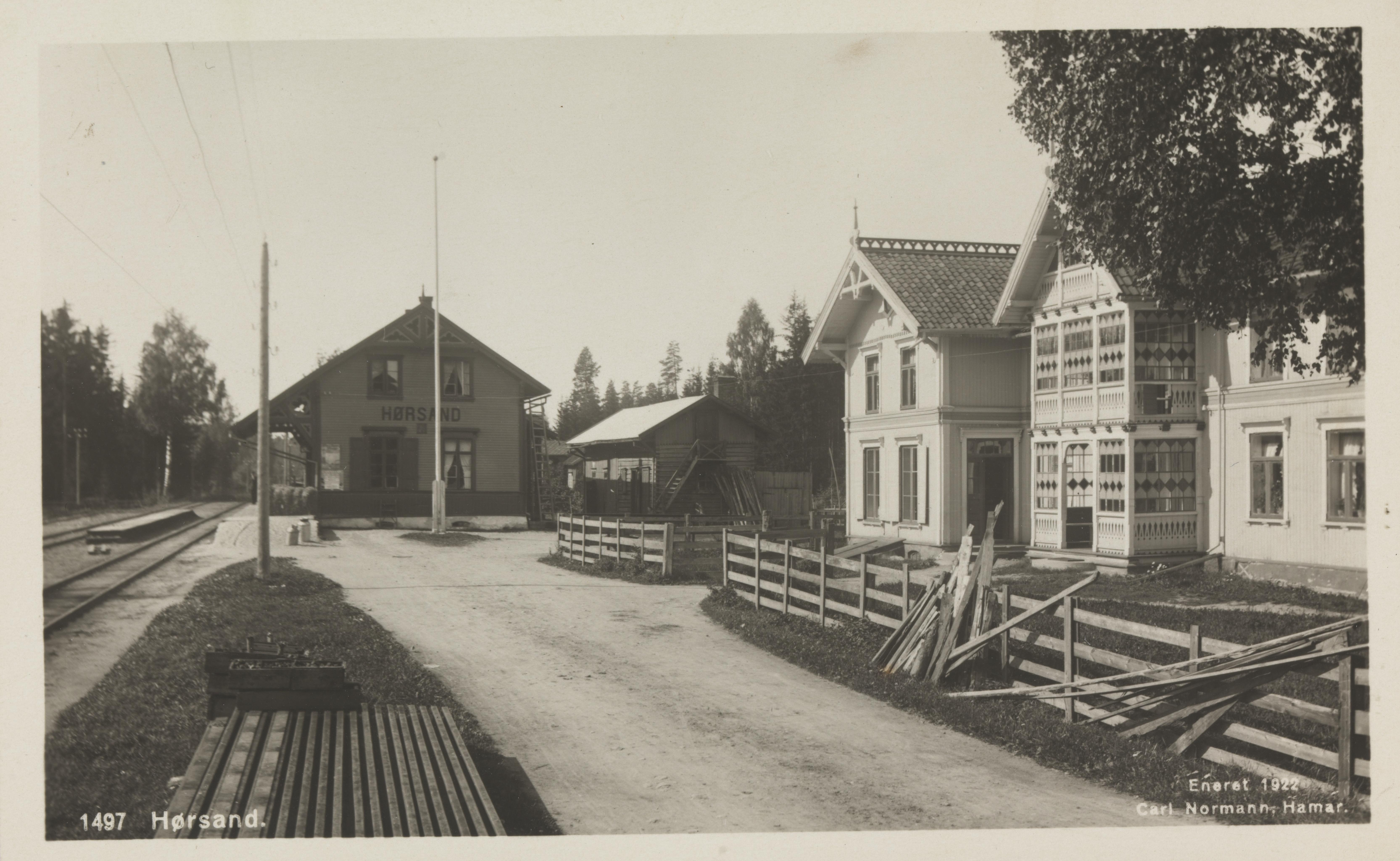 Bildet er hentet fra Nasjonalbibliotekets bildesamling Hørsand,Hørsand stasjon, Stange, Hedmark